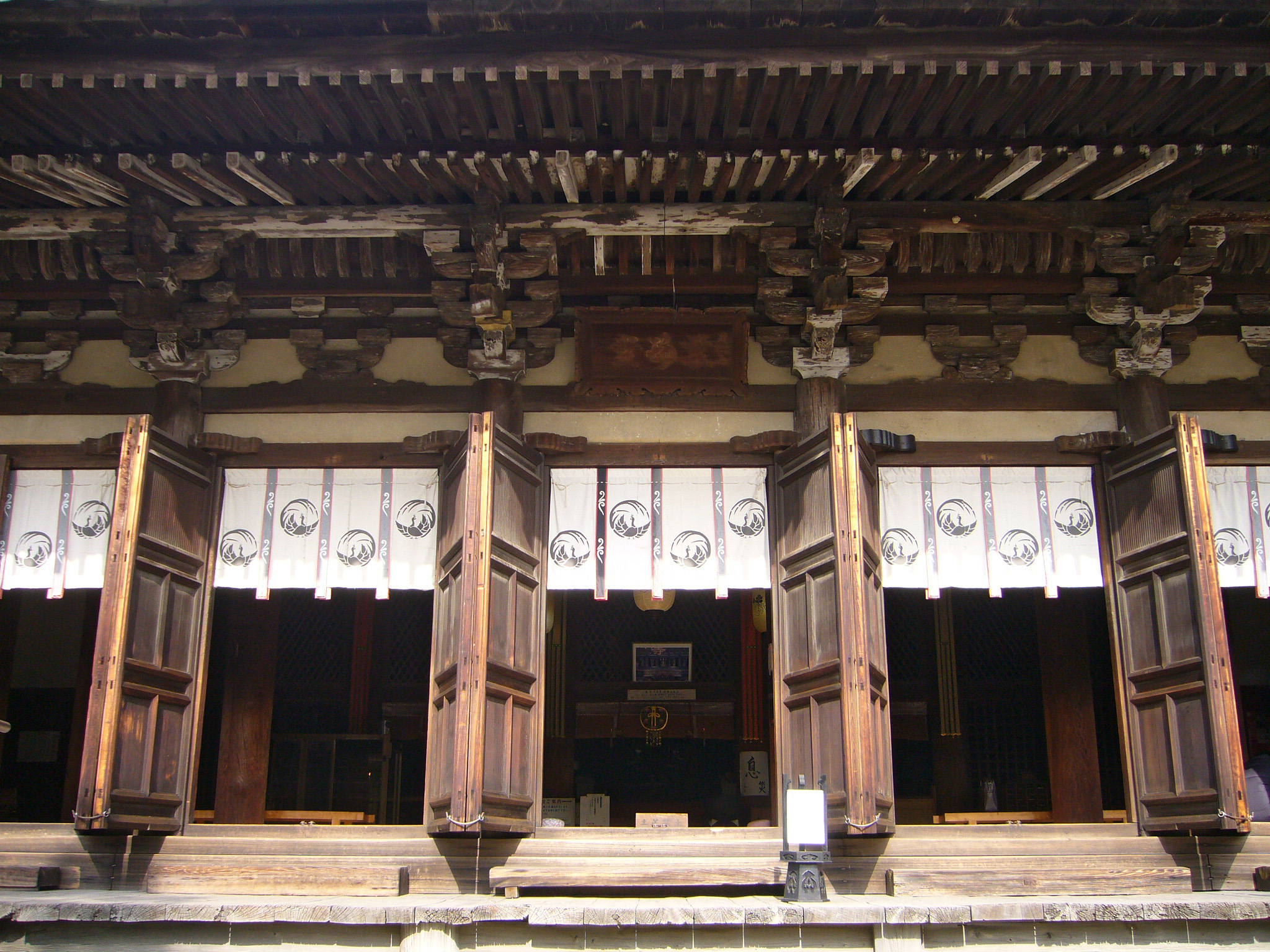 Kakurinji, Kakogawa, Hyogo, Japan